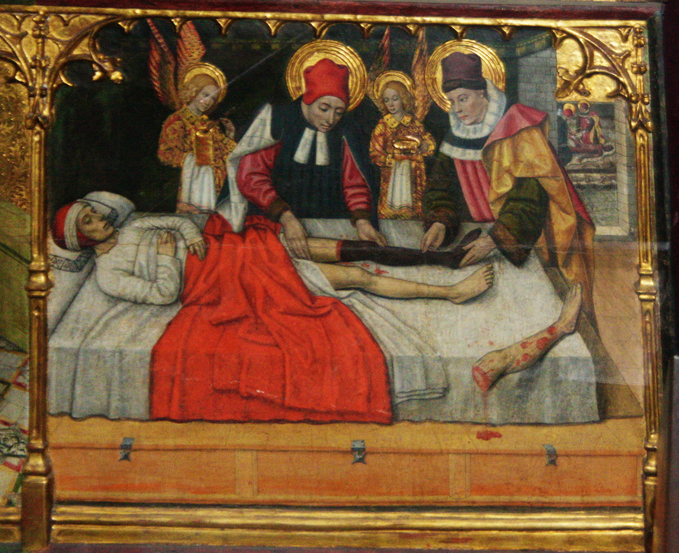 Miracle dels sants metges Cosme i Damià. És la taula central de la predel.la que està dedicada a aquests sants, dins el retaule dedicat als sants Abdó i Senén. El retaule és una de les poques obres que es poden atribuir amb tota certesa a Jaume Huguet, ja que se'n conserva el contracte de l'any 1460. Huguet és l´únic representant català de la tendència flamenca, que domina el període final del gòtic. A la taula central hi són representants els sants titulars, Abdó i Senén, prínceps de Pèrsia que van ser capturats i morts a Roma. Per causes desconegudes, sembla que les relíquies d'aquests sants van ser traslladades a Arlés del Tec (Vallespir) i d'aquí la rao que gaudissin d'un culte ben arrelat a Catalunya, invocats com a patrons de la pagesia i coneguts com Sant Nin i Sant Non. Composen el reatule un Calvari i quatre escenes relatives als sants. A la predel.la es descriuen escenes del matitiri i la mort dels sants Cosme i Damià, metges amb un possible origen àrab i, com els anteriors, també molt venerats a Catalunya. Al guardapols, decoracions de tipus vegetals i les armes de Terrassa i Barcelona. Actualment es troba a l'Església de Sant Pere de Terrassa.